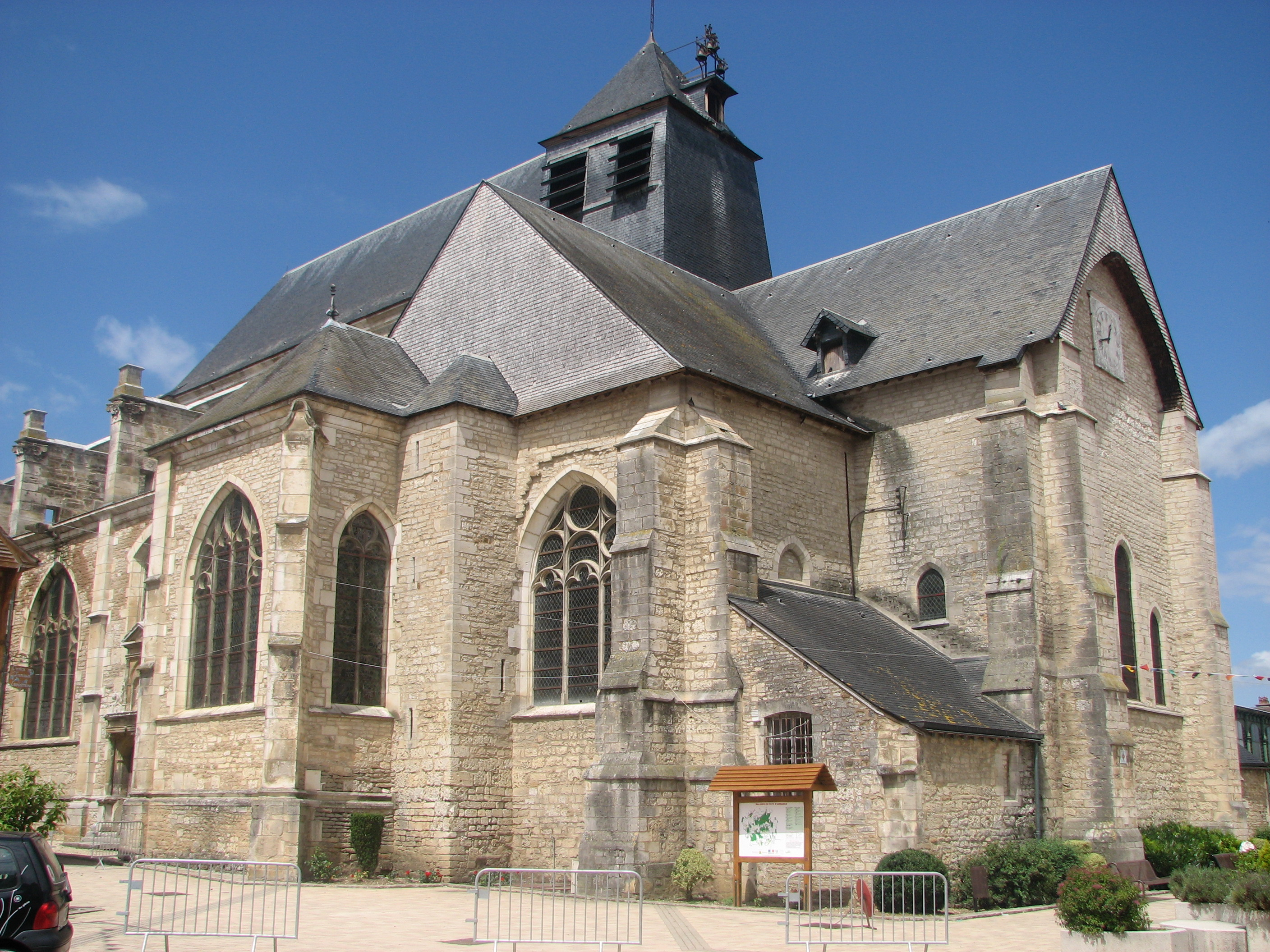 Église de Chaource (Aube)